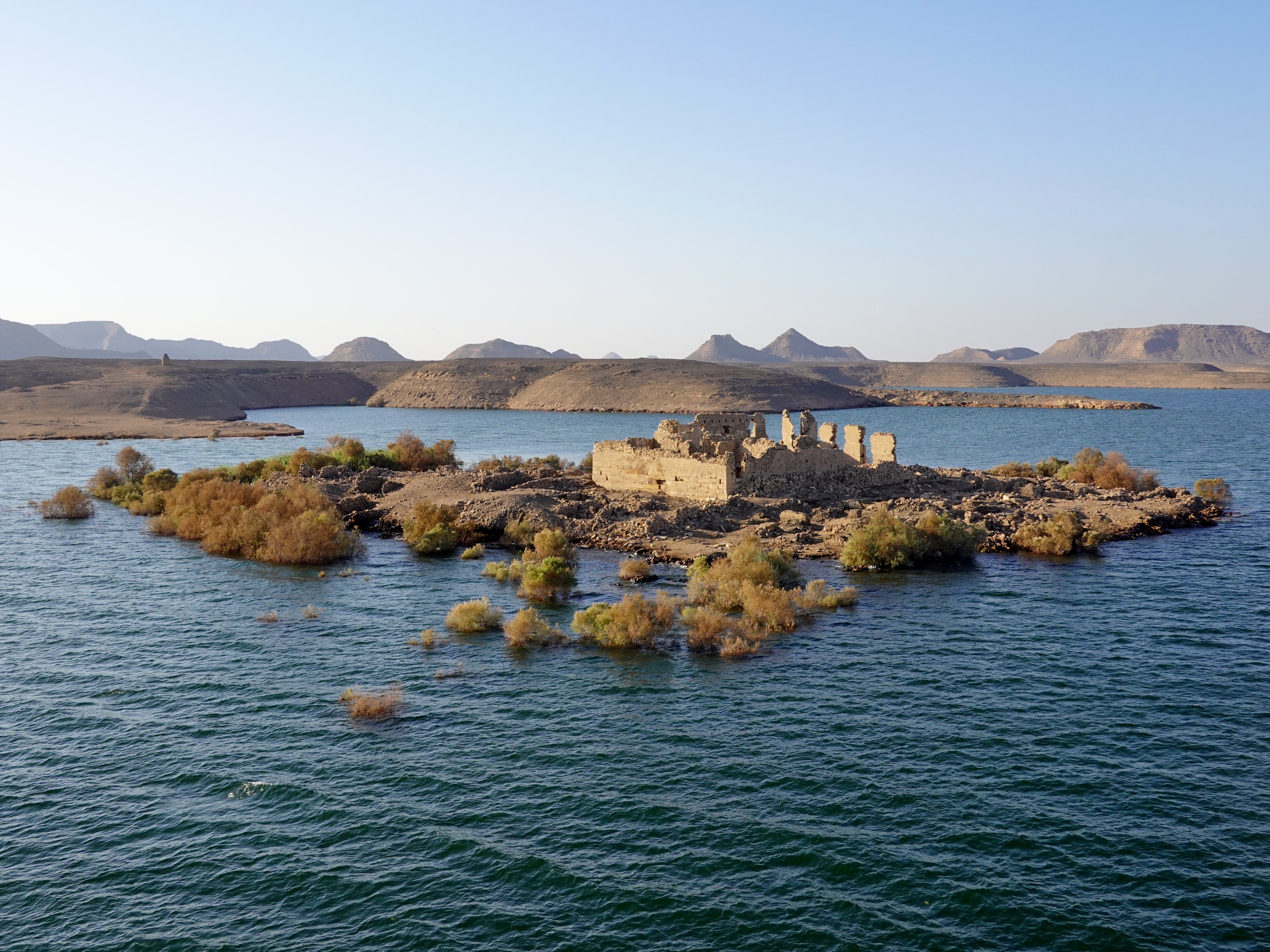 Bergspitze mit Ruinen von Qasr Ibrim im Nassersee, Ägypten